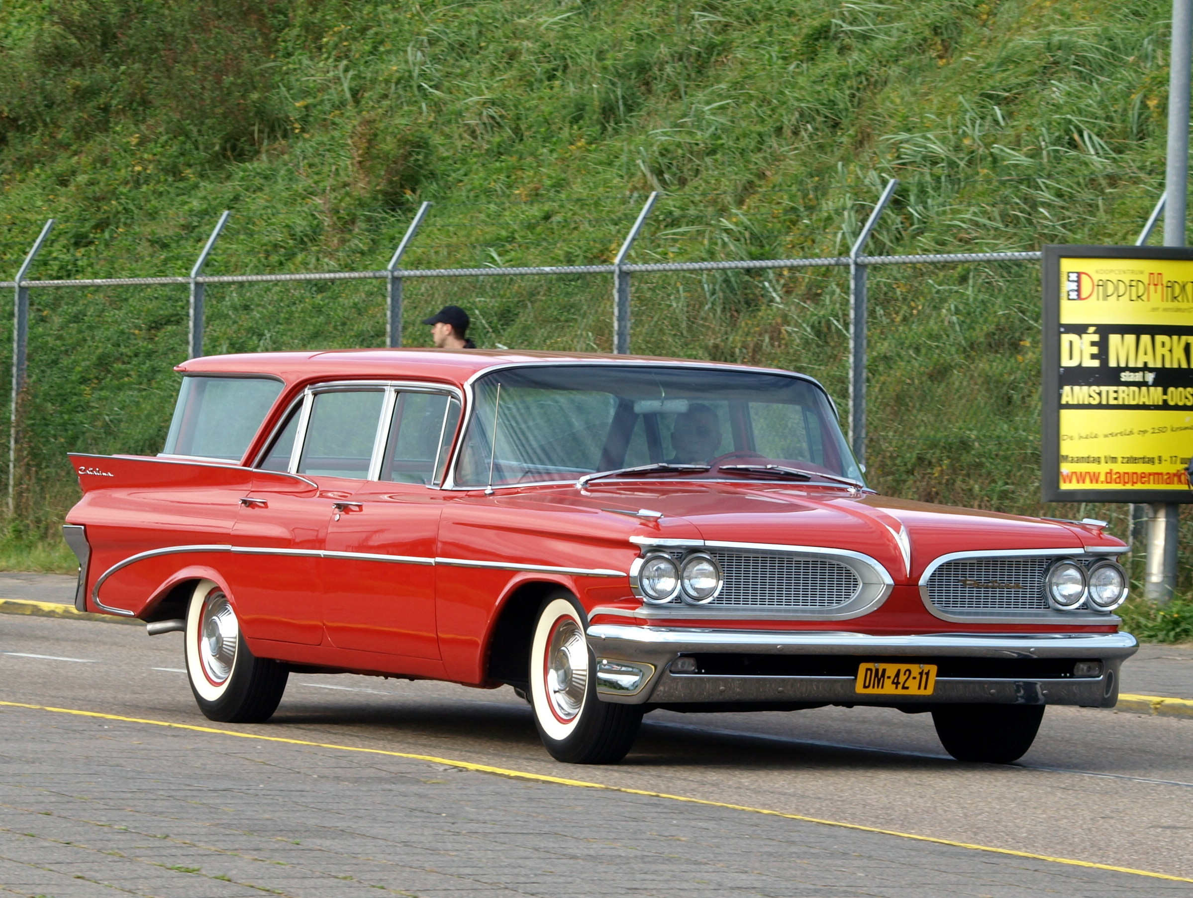 Nationaal Oldtimer Festival Zandvoort 2011.